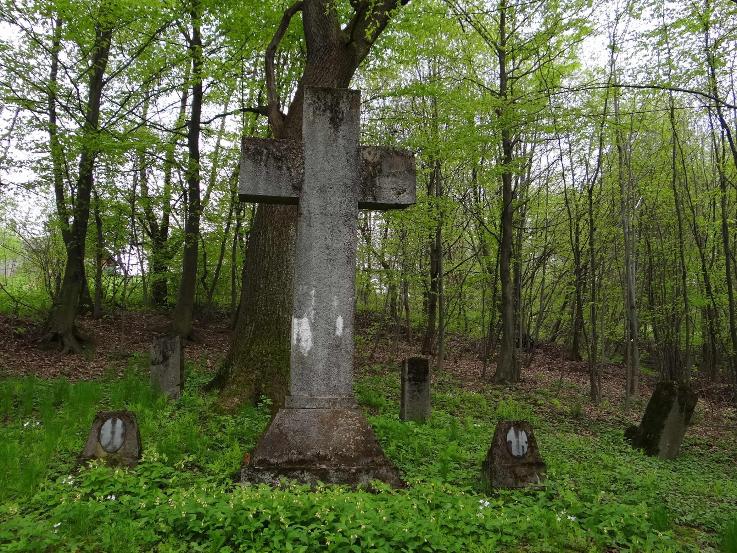 Cmentarz wojenny nr 148 – Chojnik